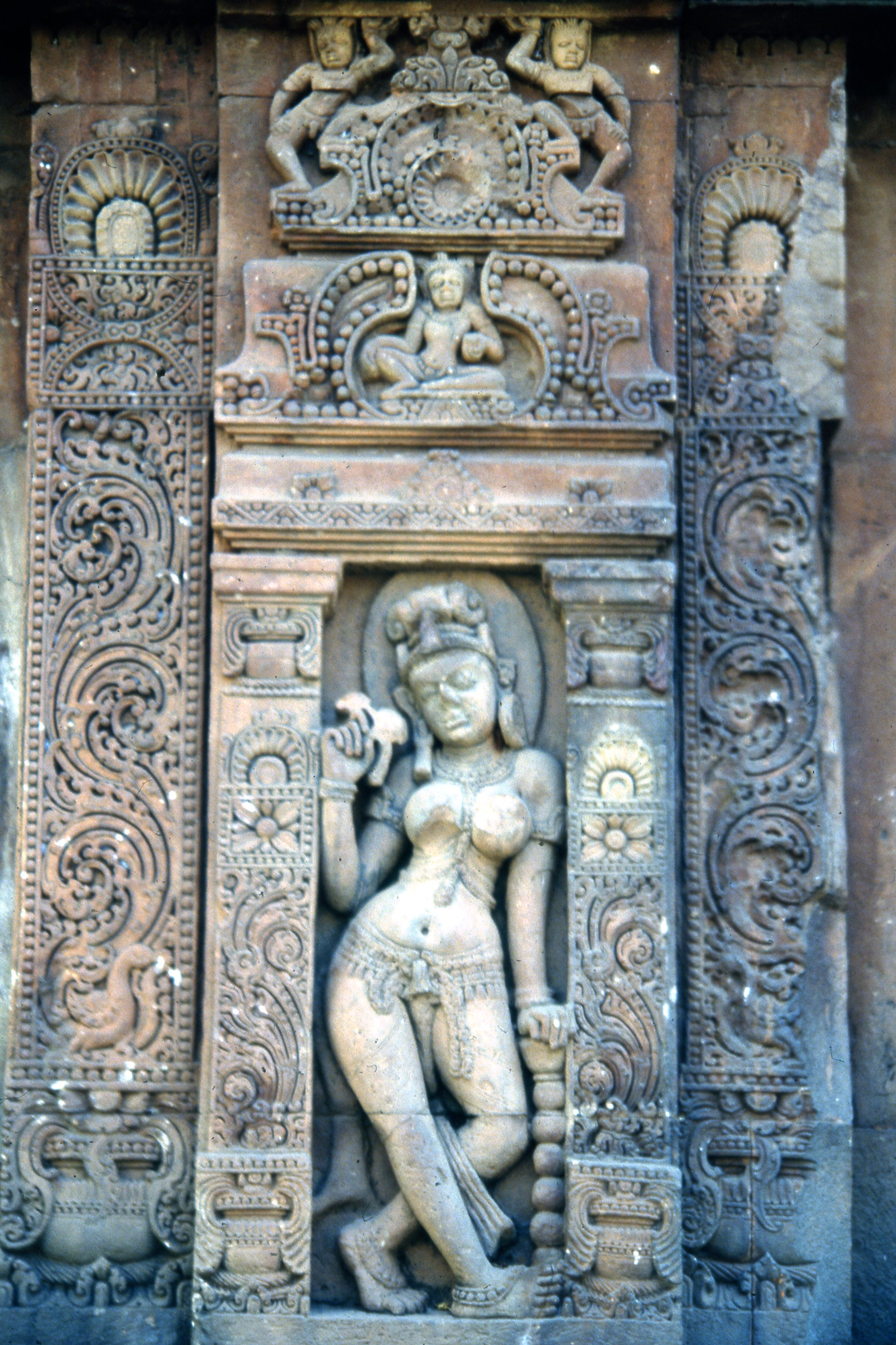 Siglo VIII,Templo Vaital Deul/Baitala Deula,arquitectura Kalinga, escultura de una Apsará enseñando a hablar a un ave que sostiene en su mano, el marco que la rodea se encuentra decorado con el símbolo de la Purna Kalasa y guirnaldas. Bhuvanesvar, Orissa, India.